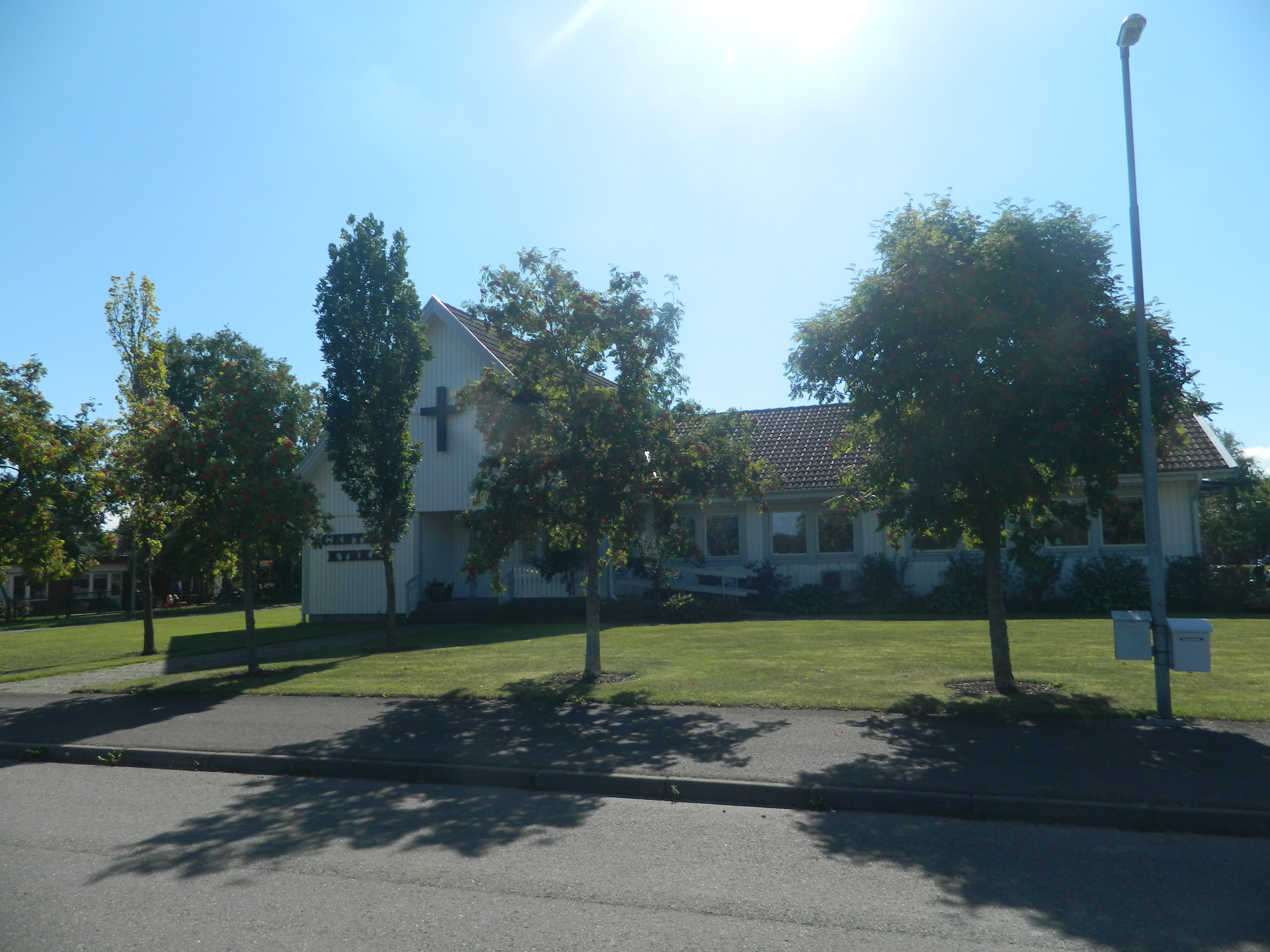 Centrumkyrkan i Kinnarp den 22 augusti 2013.